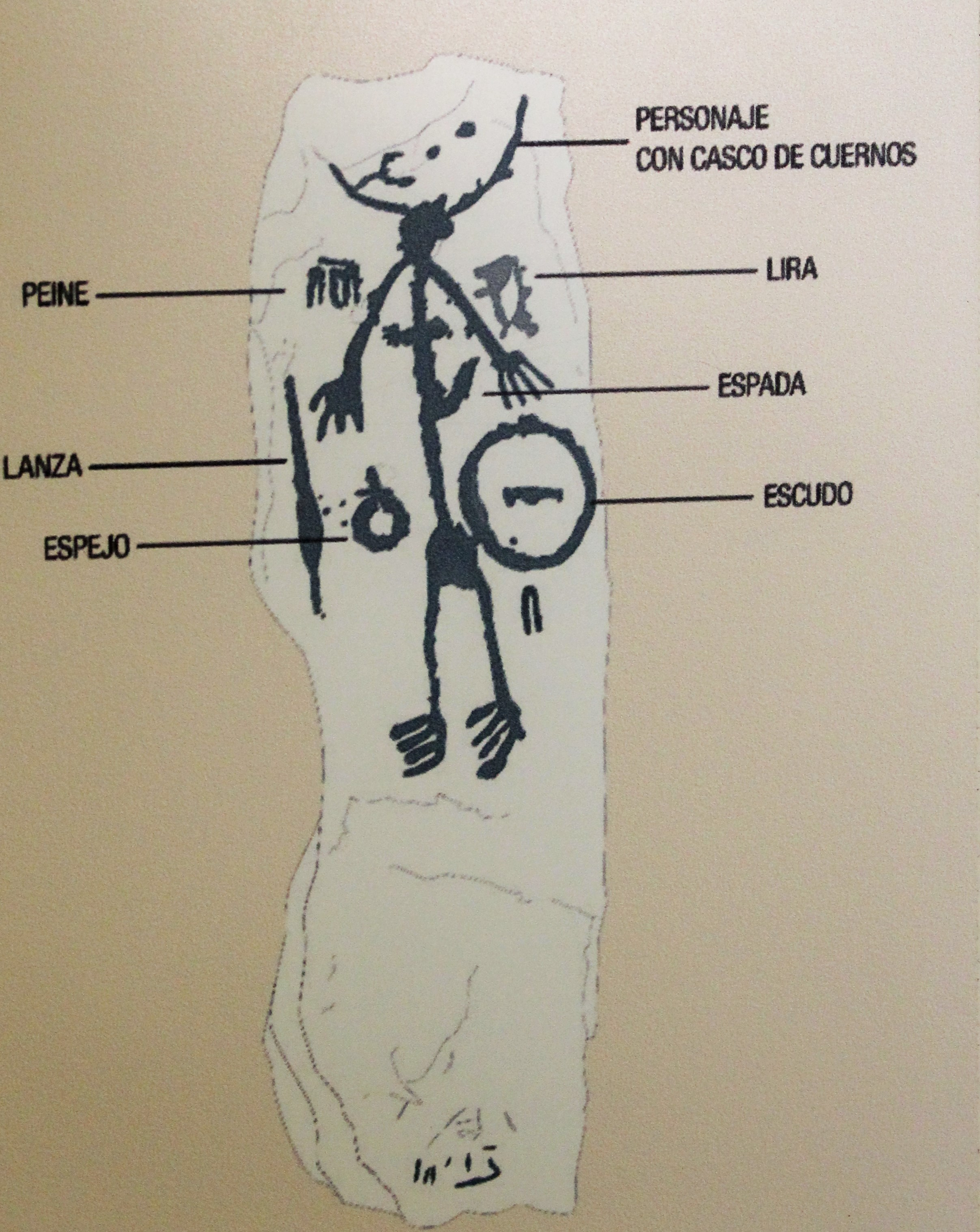 Estela de Finca Las Puercas. Esparragosa de Lares. Badajoz